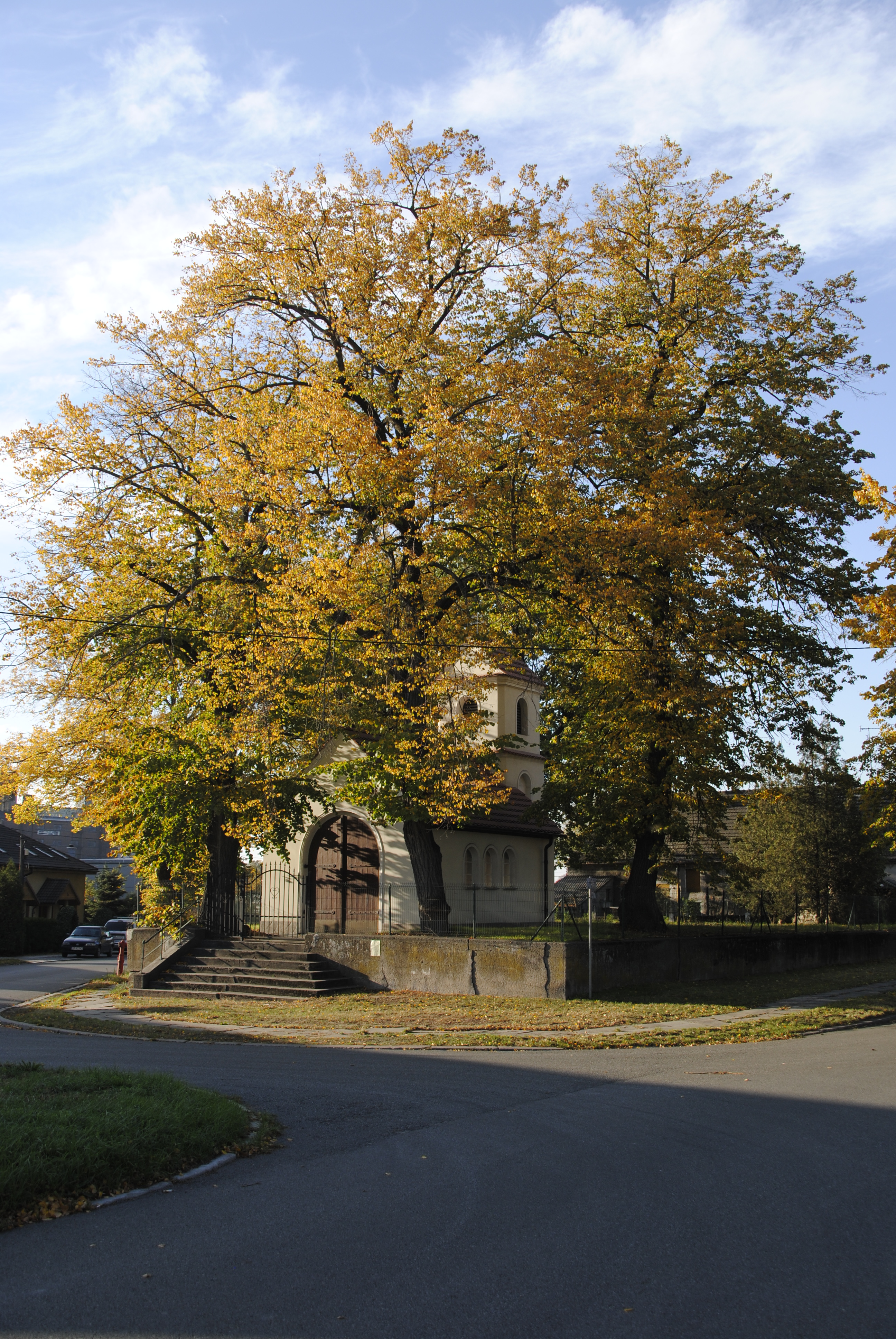 Kapelle in Oppeln-Sakrau